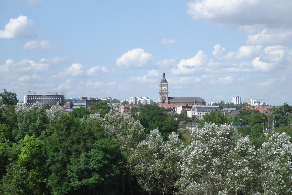 Photo prise par mes soins, il s'agit de la ville de Lens 62300 vu depuis le haut du terril du parc des glissoires a Avion 62210 France